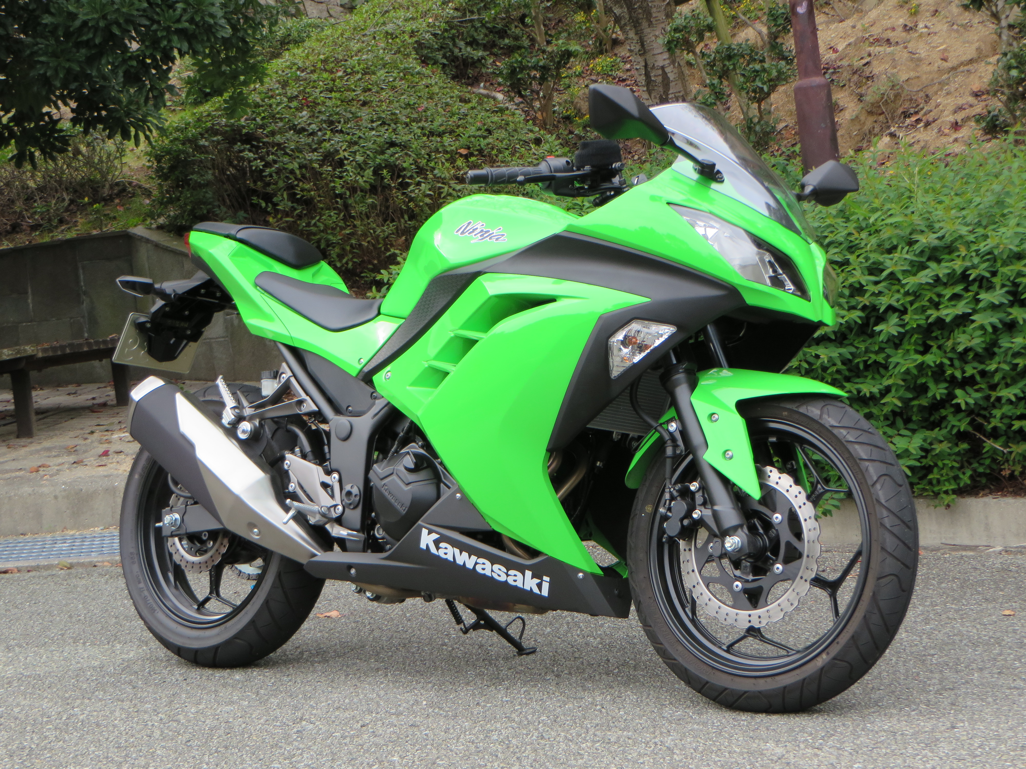 自分のバイクの画像です。